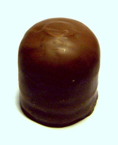 Schokoladenkuss